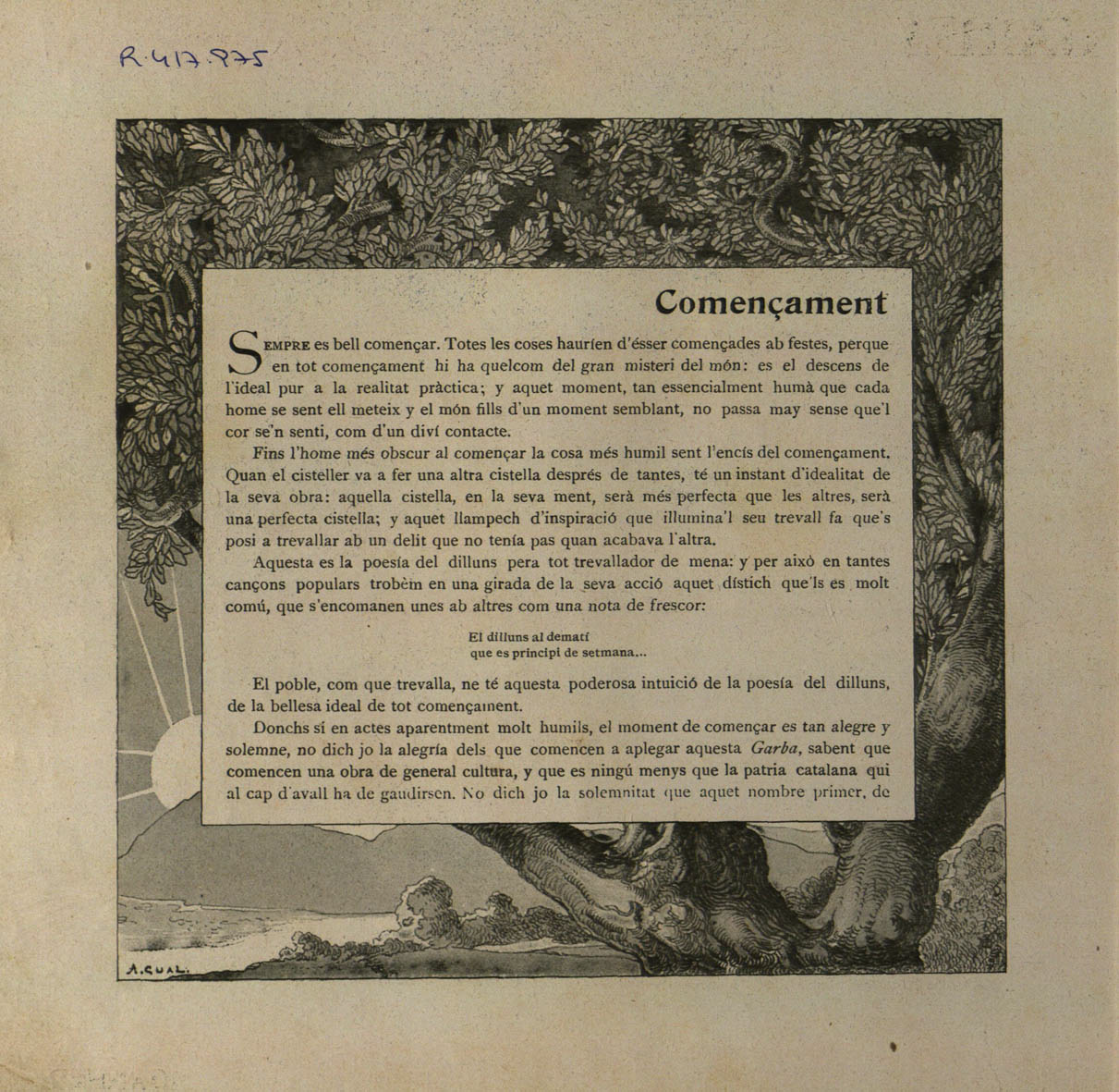 Garba (revista)